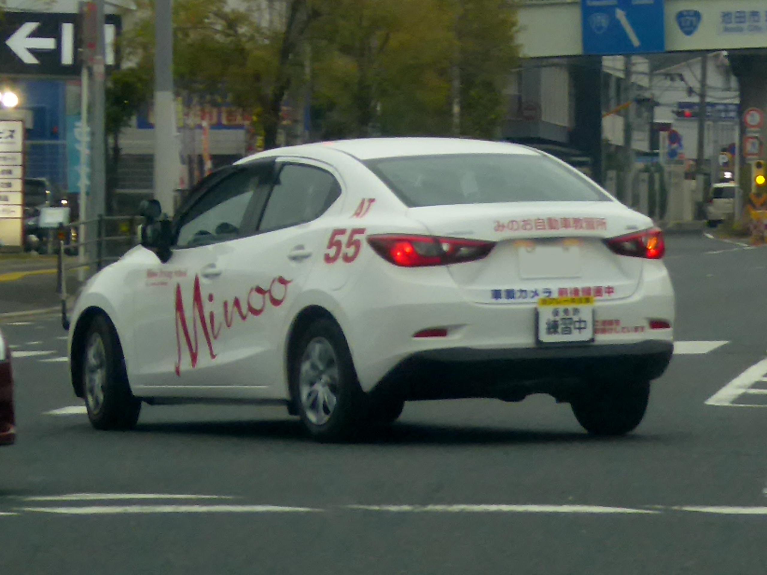 みのお自動車教習所の4BA-DJLFJ型マツダ教習車を撮影。